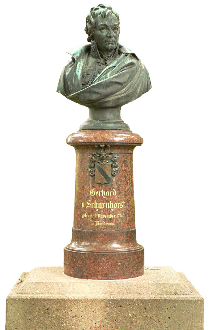 First upload on German wikipedia by Benutzer:AxelHH, 00:39, 17. Mai 2007 Original file name: Bild:Scharnhorst Bordenau.jpg Description: Gerhard von Scharnhorst- Denkmal in Bordenau (1905) nach einem Modell von Alexander Tondeur; fertiggestellt nach dessen Tod von seinem Gehilfen Fritz Sarcander Author=Axel Hindemith] Date = Mai 2007